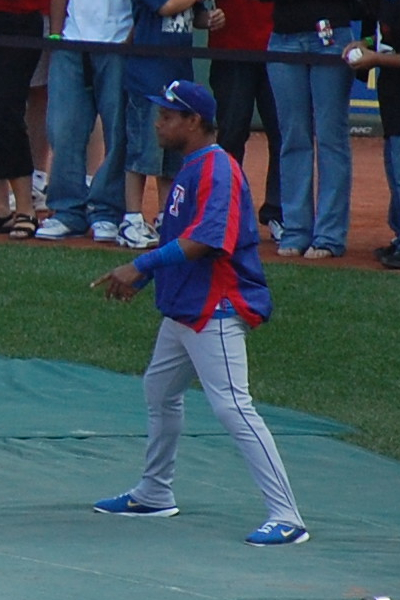 Sammy Sosa